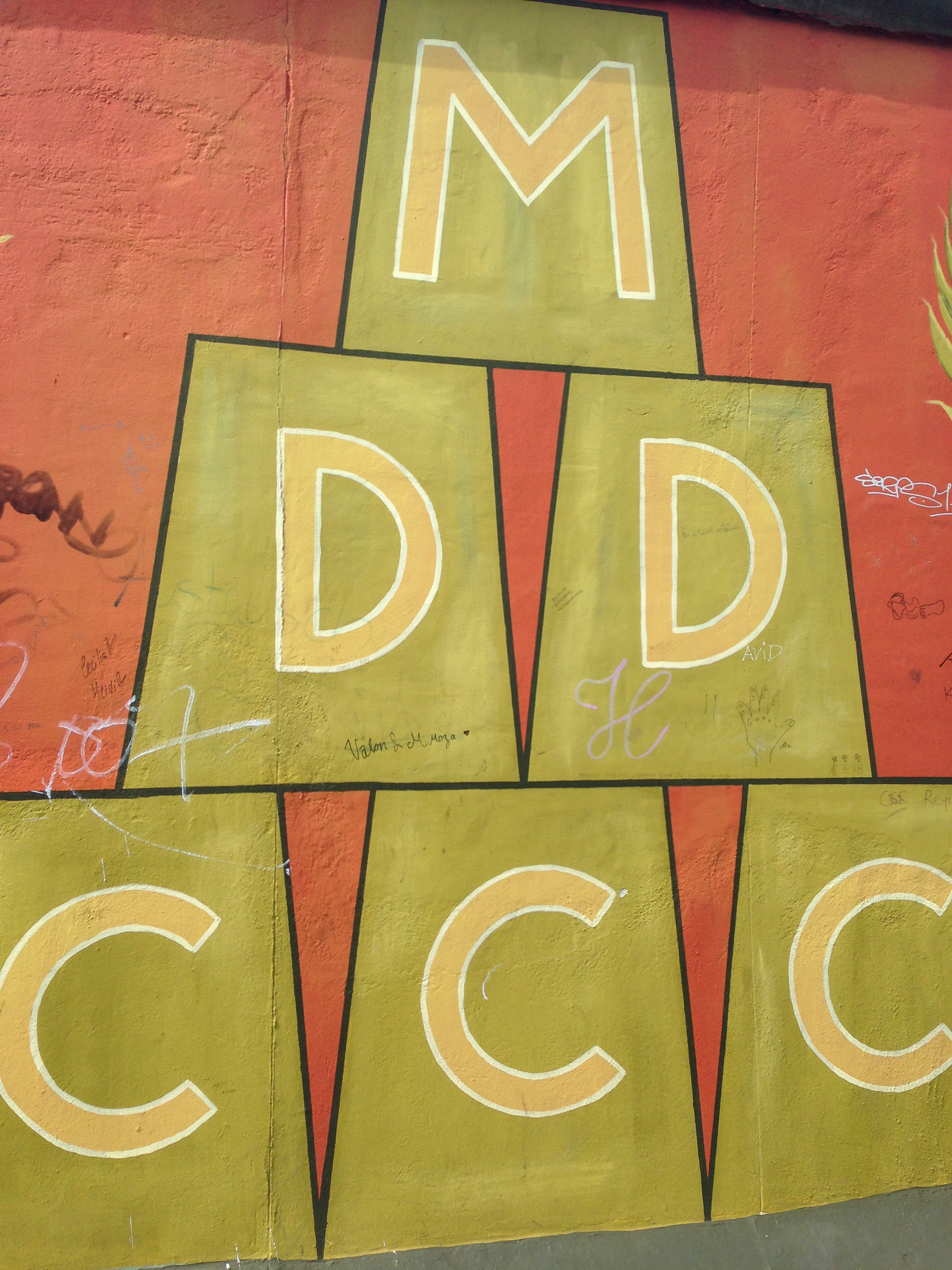 East-Side-Gallery, Berlin. Ausschnitt aus dem Motiv ohne Titel von Gábor Gerhes.